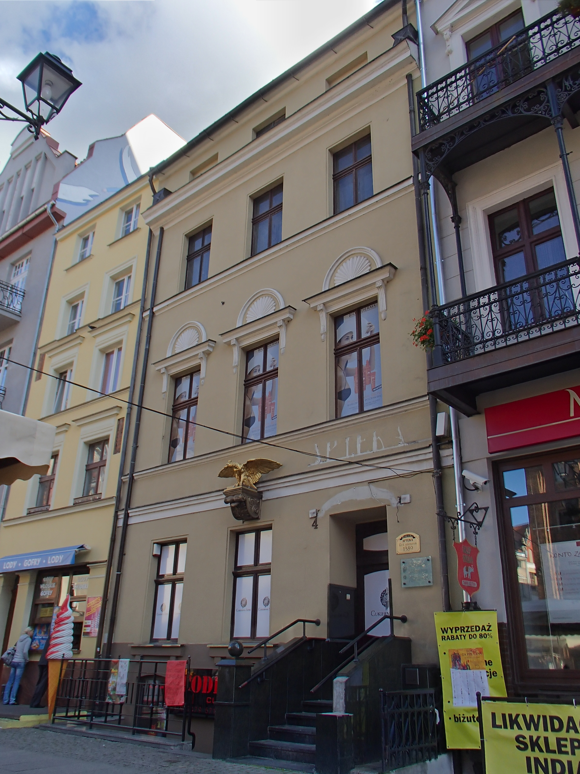 Toruń, Rynek Staromiejski 4 - kamienica "Pod Orłem", XV, XVIII, 1932-1854 (zabytek nr A/924)